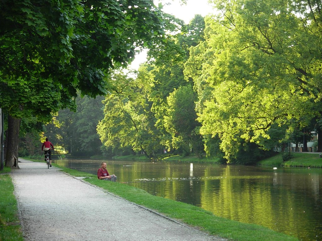 Planty nad kanałem bydgoskim